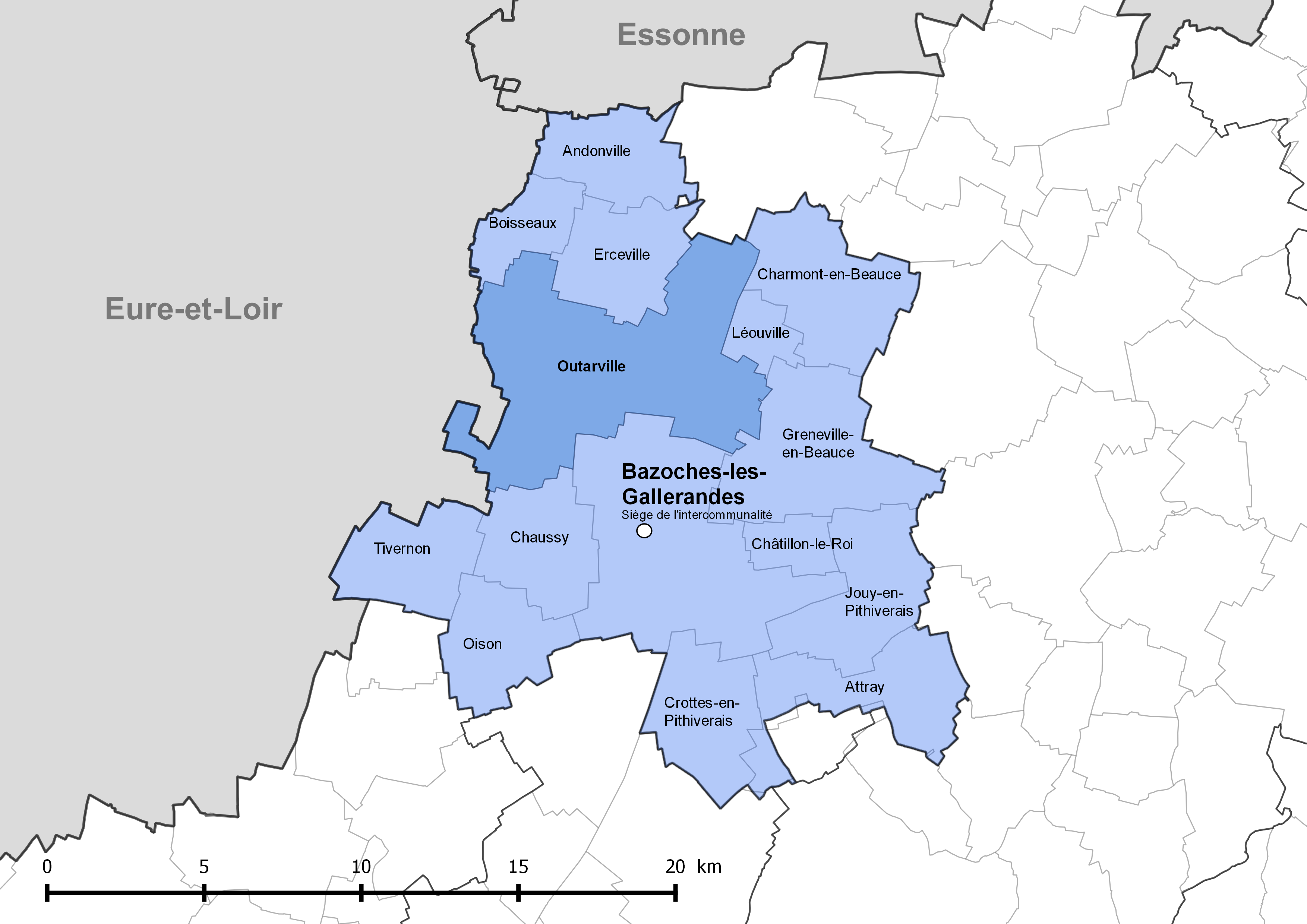 Périmètre de la communauté de communes de la Plaine du Nord Loiret - Situation de la commune de Outarville.